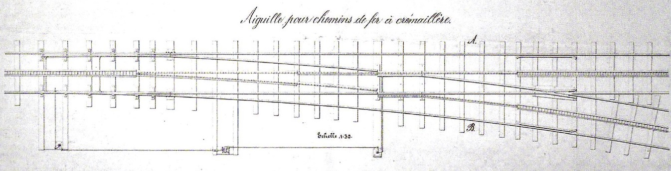 Plan der 1875 von Niklaus Riggenbach erbauten Zahnstangenweiche